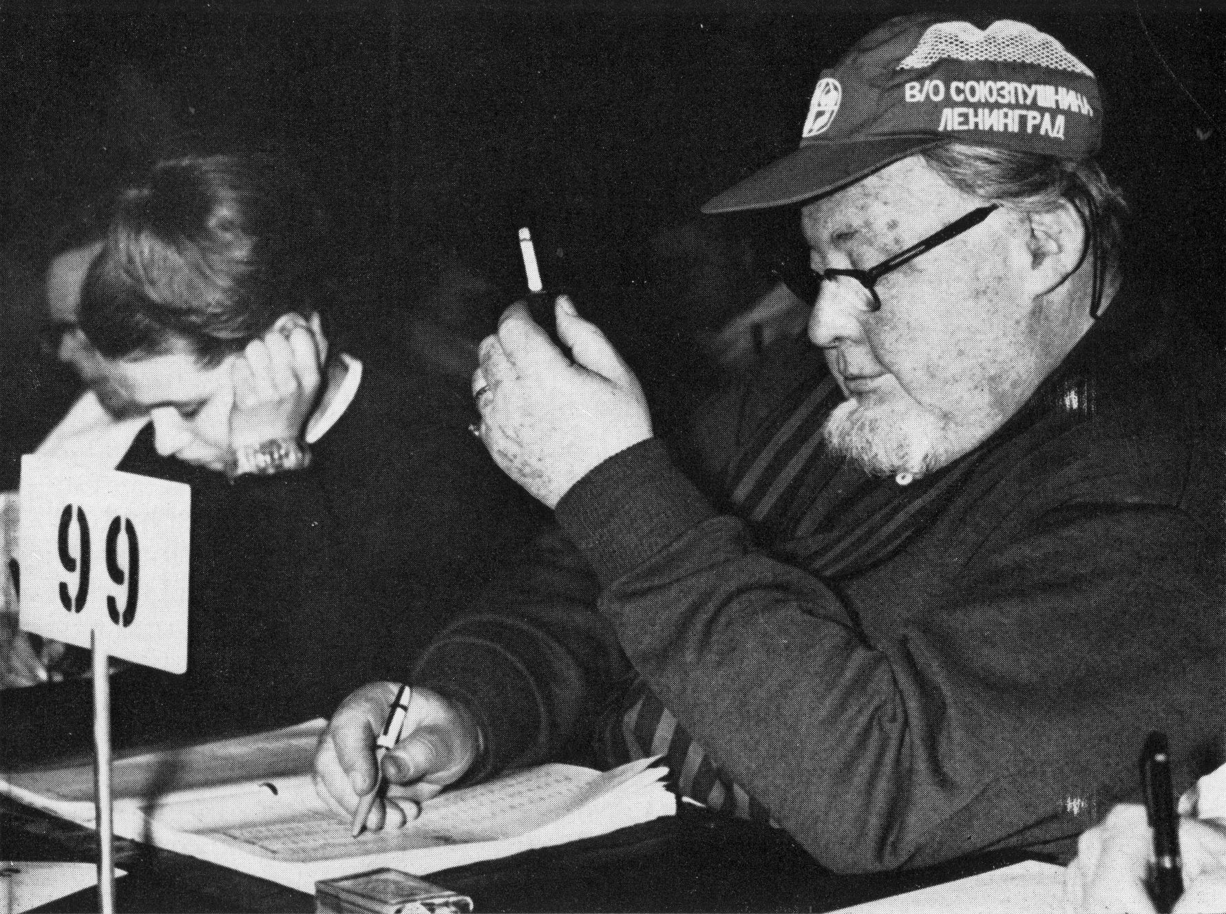 Jury Fränkel auf einer Auktion in Leningrad. Jury Fränkel (* 8. April 1899 in Moskau; † 8. Februar 1971 in Lagny-sur-Marne), Rauchwarenhändler und Kosmopolit, war eine herausragende Persönlichkeit der Pelzbranche. Mit seinem Werk „Rauchwarenhandbuch“ über die Pelztiere und deren Fellarten schuf er die Grundlage für das bis heute bedeutendste Nachschlagewerk der Branche, „Jury Fränkel's Rauchwarenhandbuch“. In der Autobiographie „Einbahnstraße“ schilderte er sein bewegtes Leben mit zwei Weltkriegen, als deutschstämmiger Jude und Pelzhändler in seiner ersten Heimat Russland, dann im Welt-Pelzhandelszentrum Leipziger Brühl und anschließend in Schweden, sowie seine ständigen Reisen zu den Einkaufsstätten für Pelzfelle. Seine letzten Lebensjahre verbrachte er mit seiner Familie in Paris.